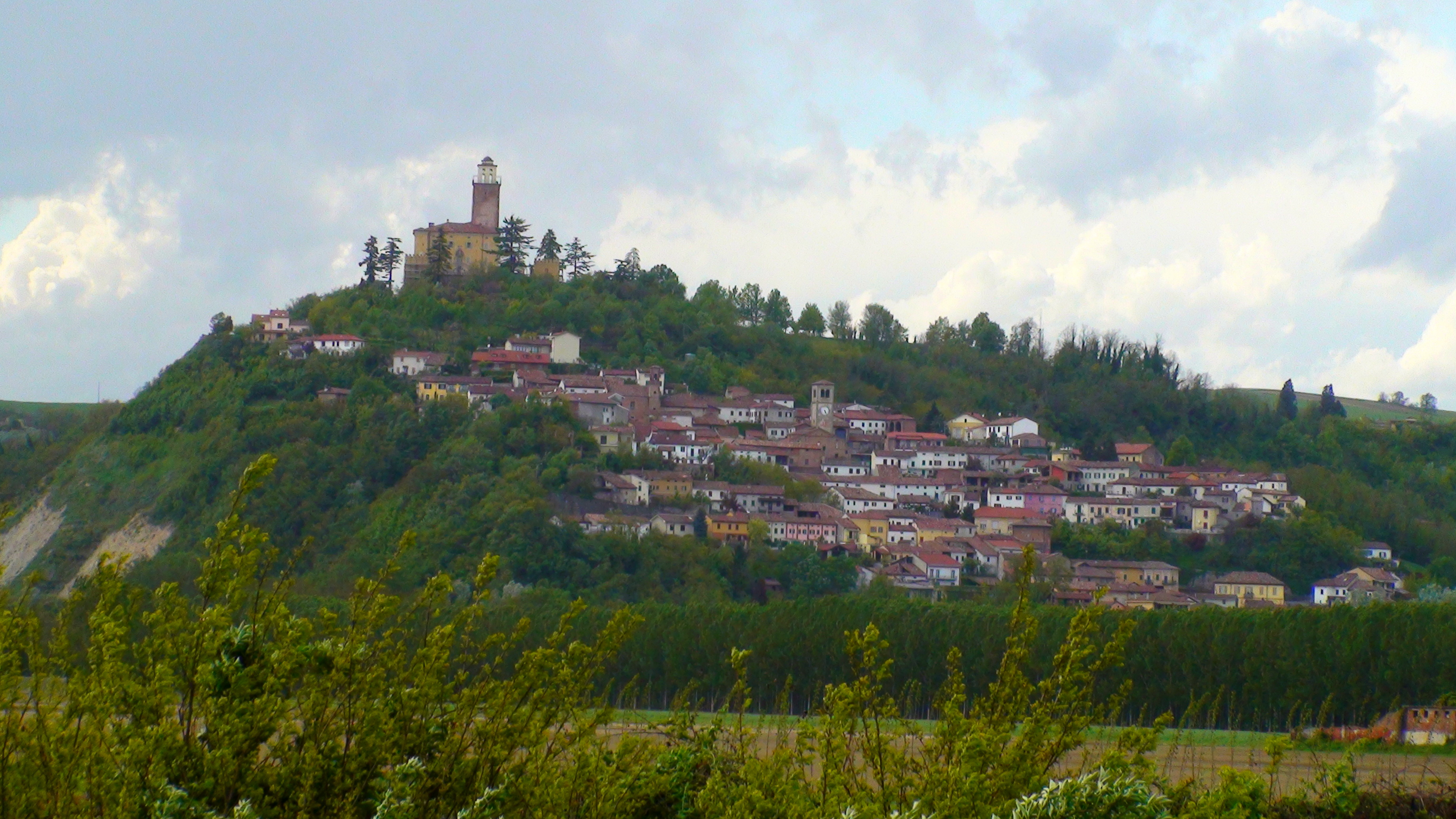 Montecastello visto dalla campagna di Lobbi 1